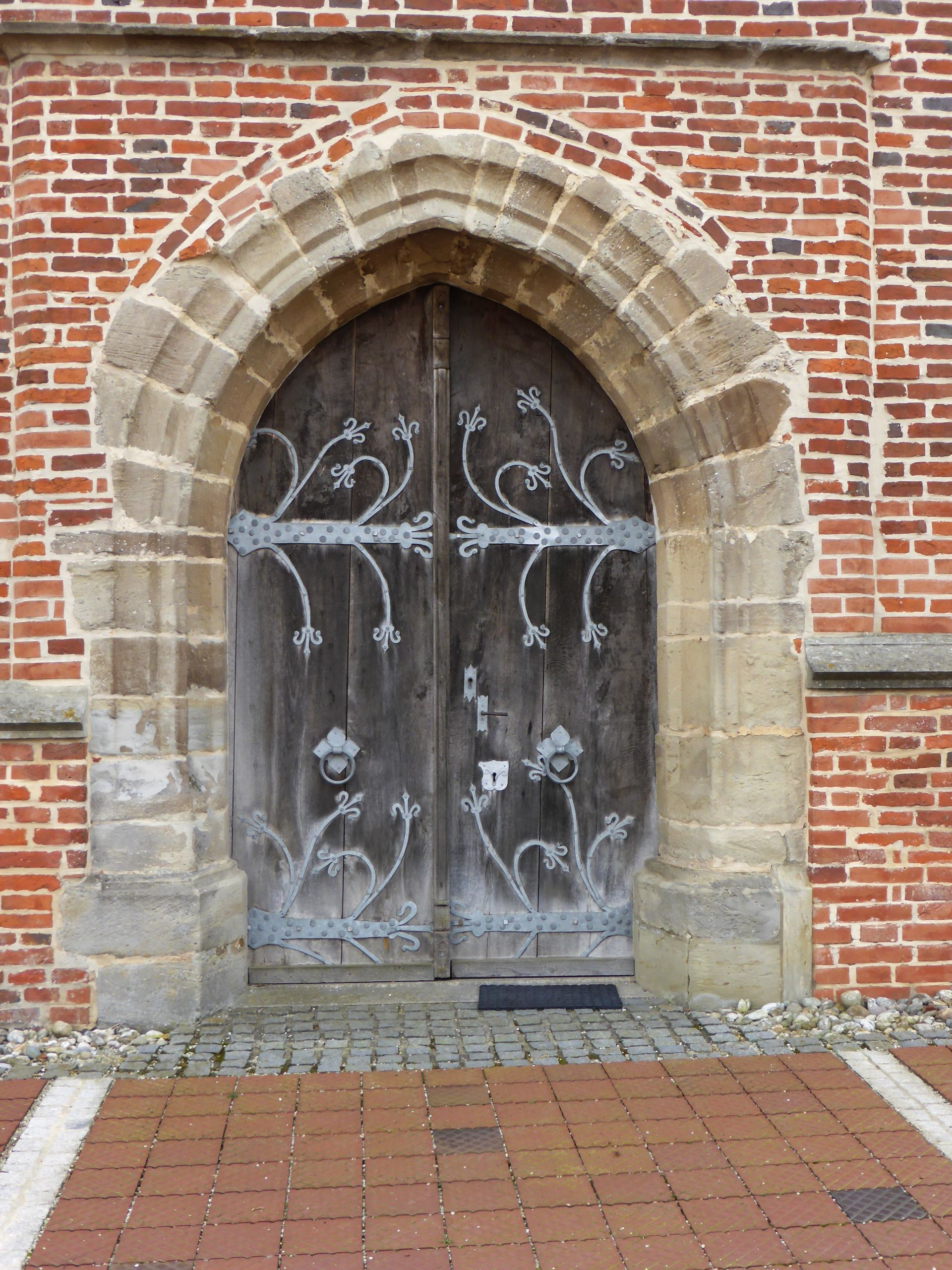 Massing (Wallfahrtskirche St. Corona Staudach)